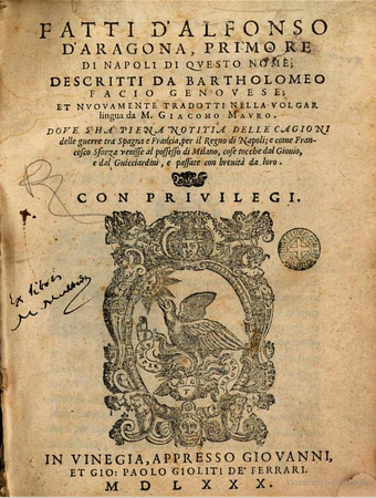 Fatti d'Alfonso d'Aragona, primo ne di Napoli di questo mome descritti da Bartholomo Facio Genovese, 1580, Bartolomeo Facio (1400-1457)